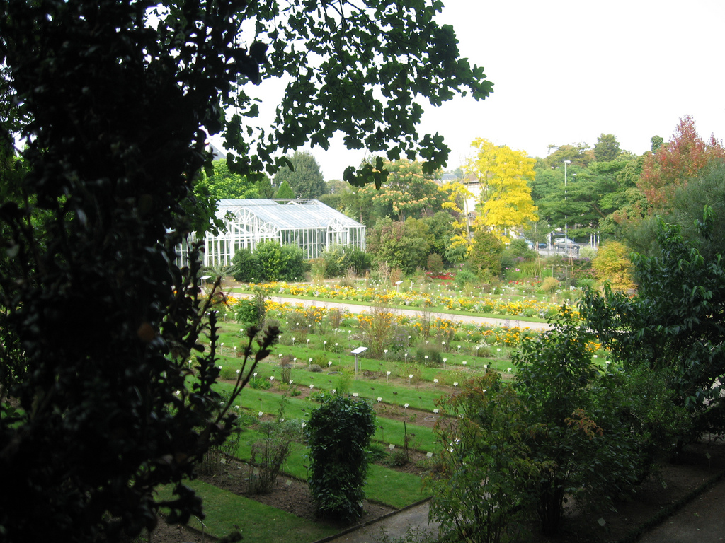 Jardin botanique du jardin des plantes de Caen depuis le belvédère